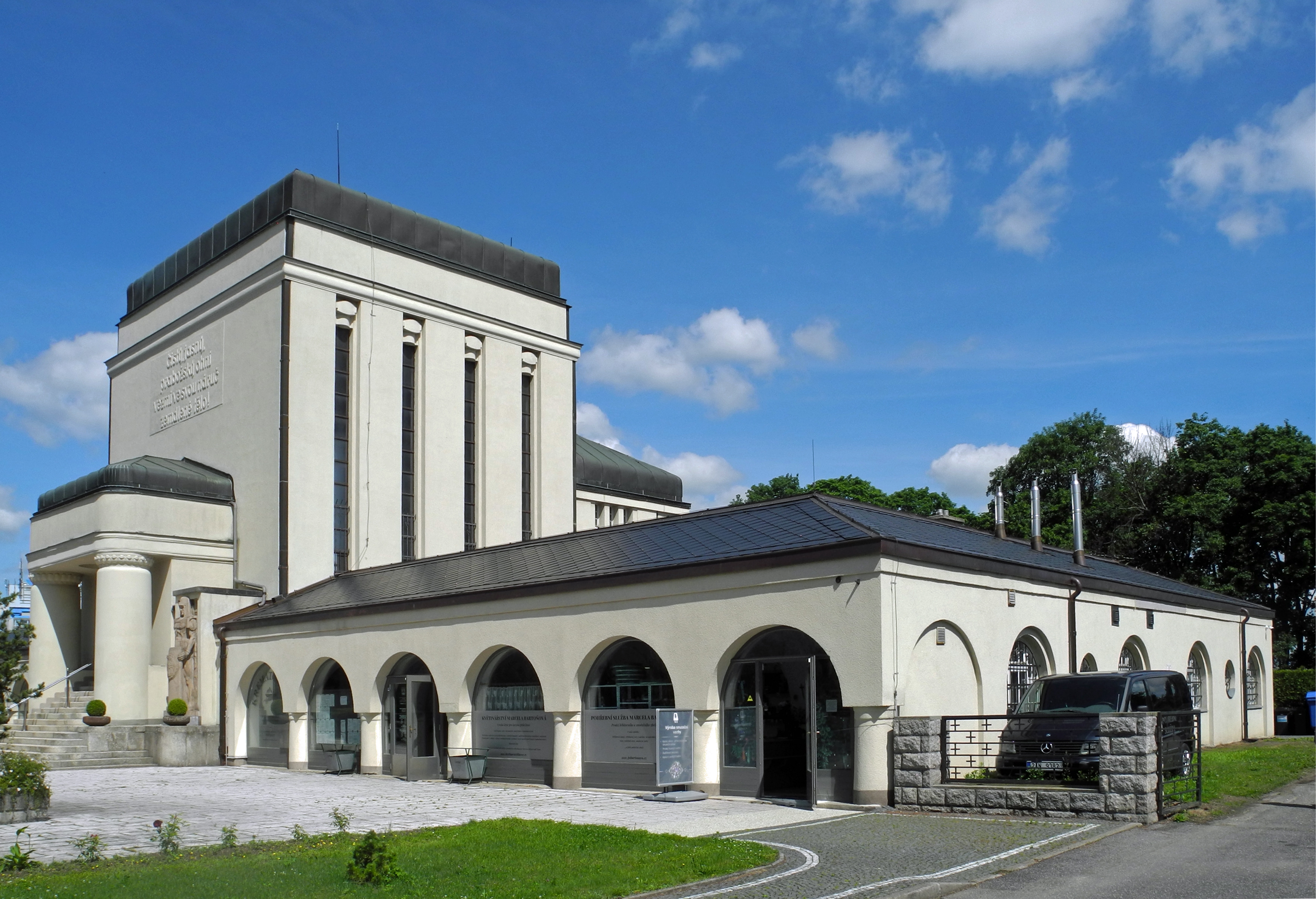 Krematorium in Reichenberg – Liberec, U Krematoria 460/7, errichtet 1915–1917, Architekt: Rudolf Bitzan, mit dem Spruch von Anton August Naaf: „Reines, urgöttliches, herrliches Feuer, nimm in die Arme den erdmüden Leib!“, Wächterstatuen vom Bildhauer Alois Rieber (1876-1944).